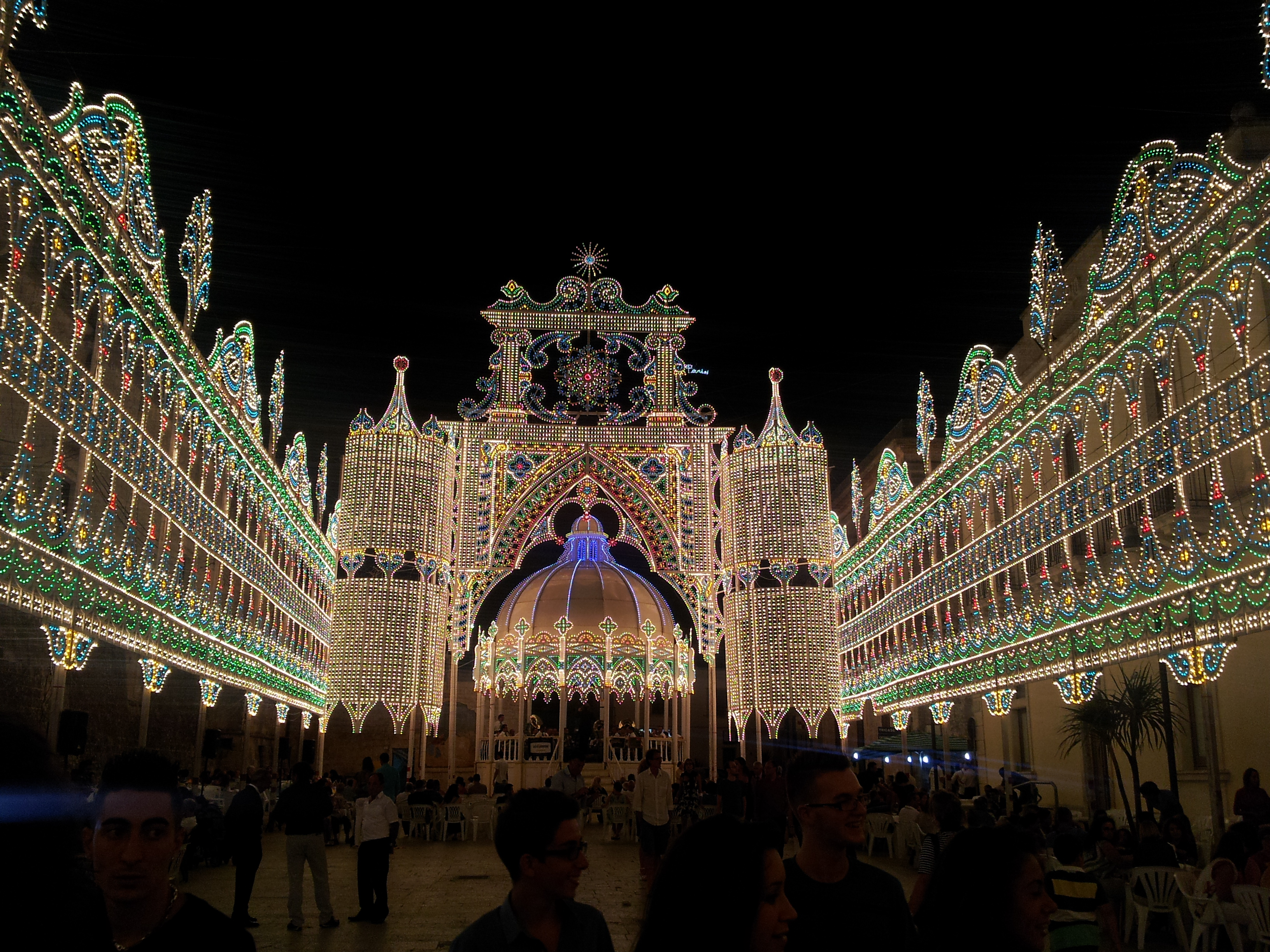 Andrano, festa patronale della Madonna delle Grazie: le luminarie. Foto scattata da me durante la manifestazione.